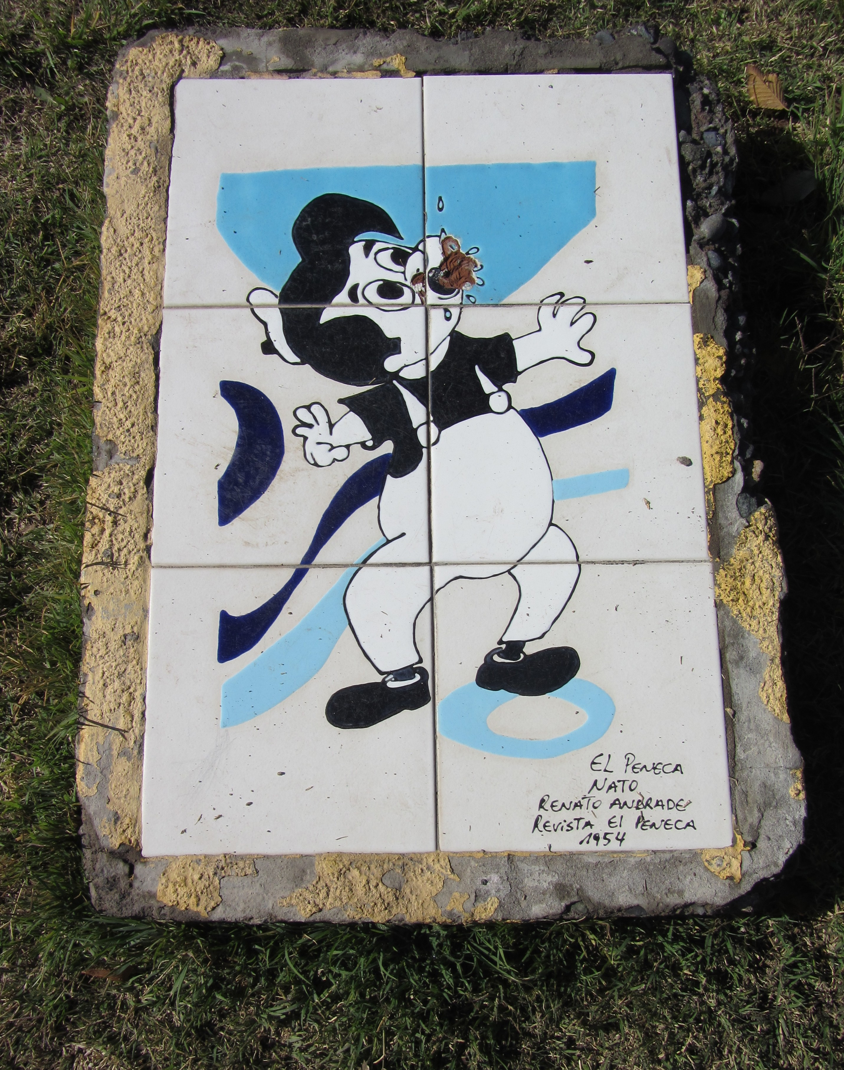 Imagen en cerámica de una caricatura de El Peneca, personaje de Nato (Renato Andrade) para el semanario infantil del mismo nombre en 1954. Parque del Cómic de San Miguel, Santiago.